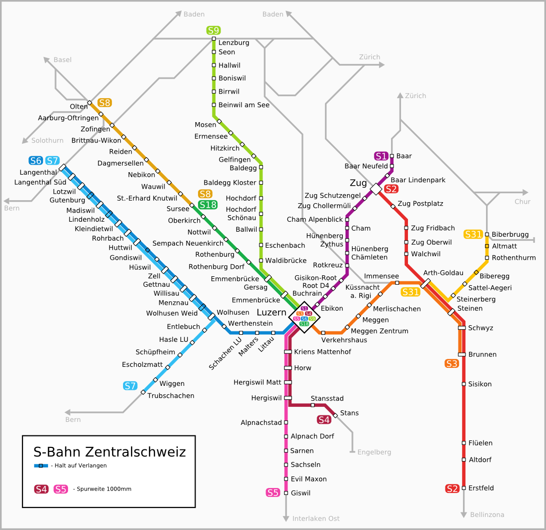 S-Bahn-Netz Zentralschweiz